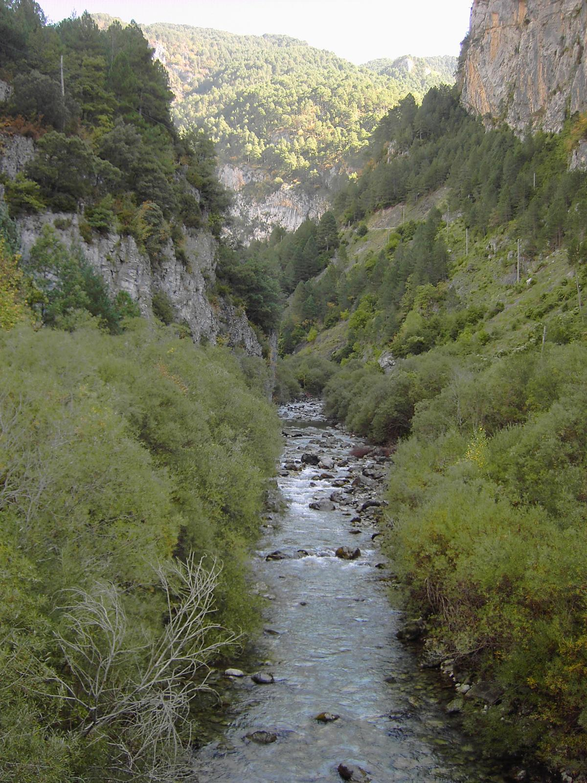 El Cinqueta a su paso por el estrecho de San Martín, junto a Saravillo, tal como baja de Gistau.